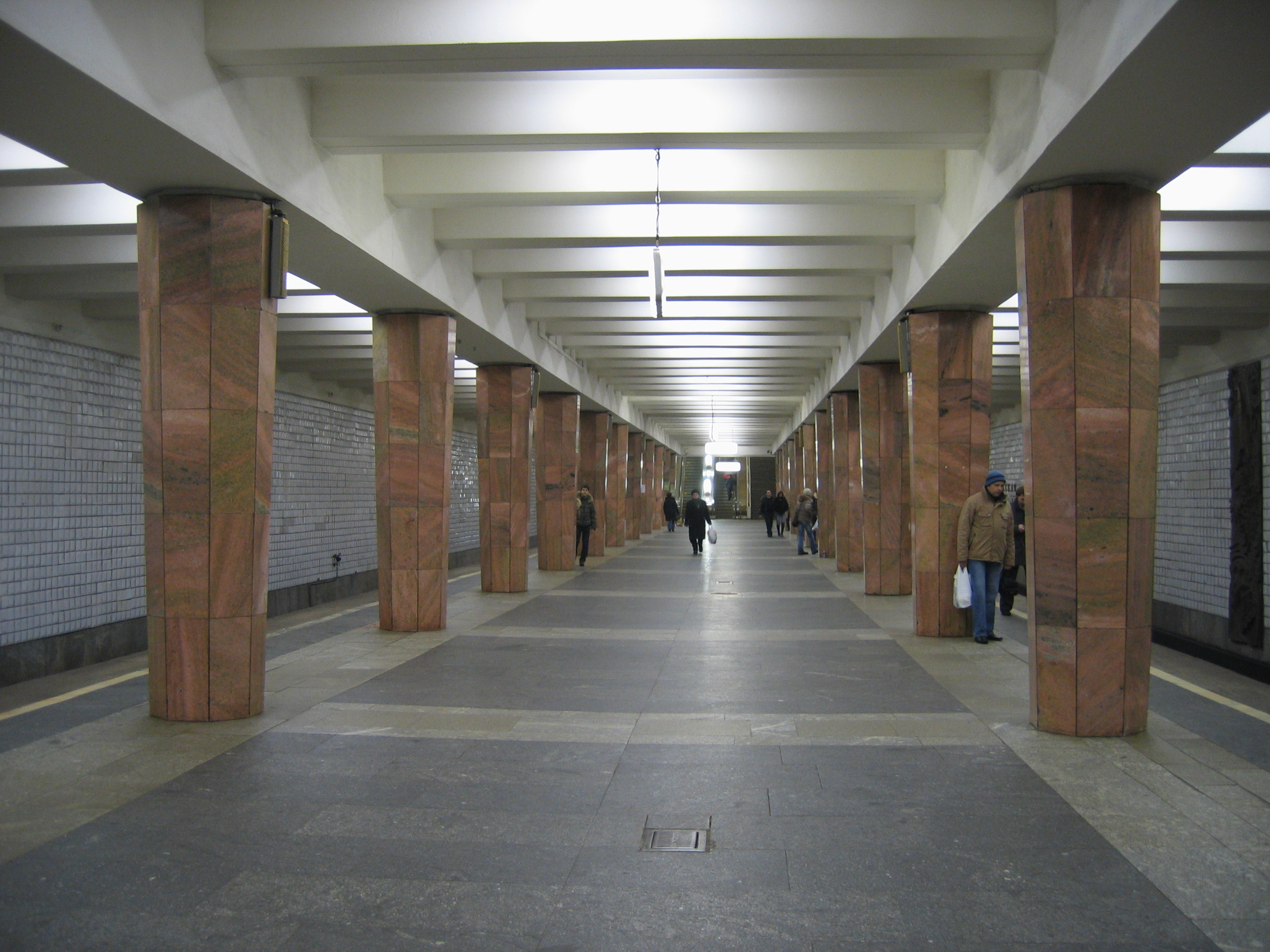 Московский метрополитен. Станция Калужская